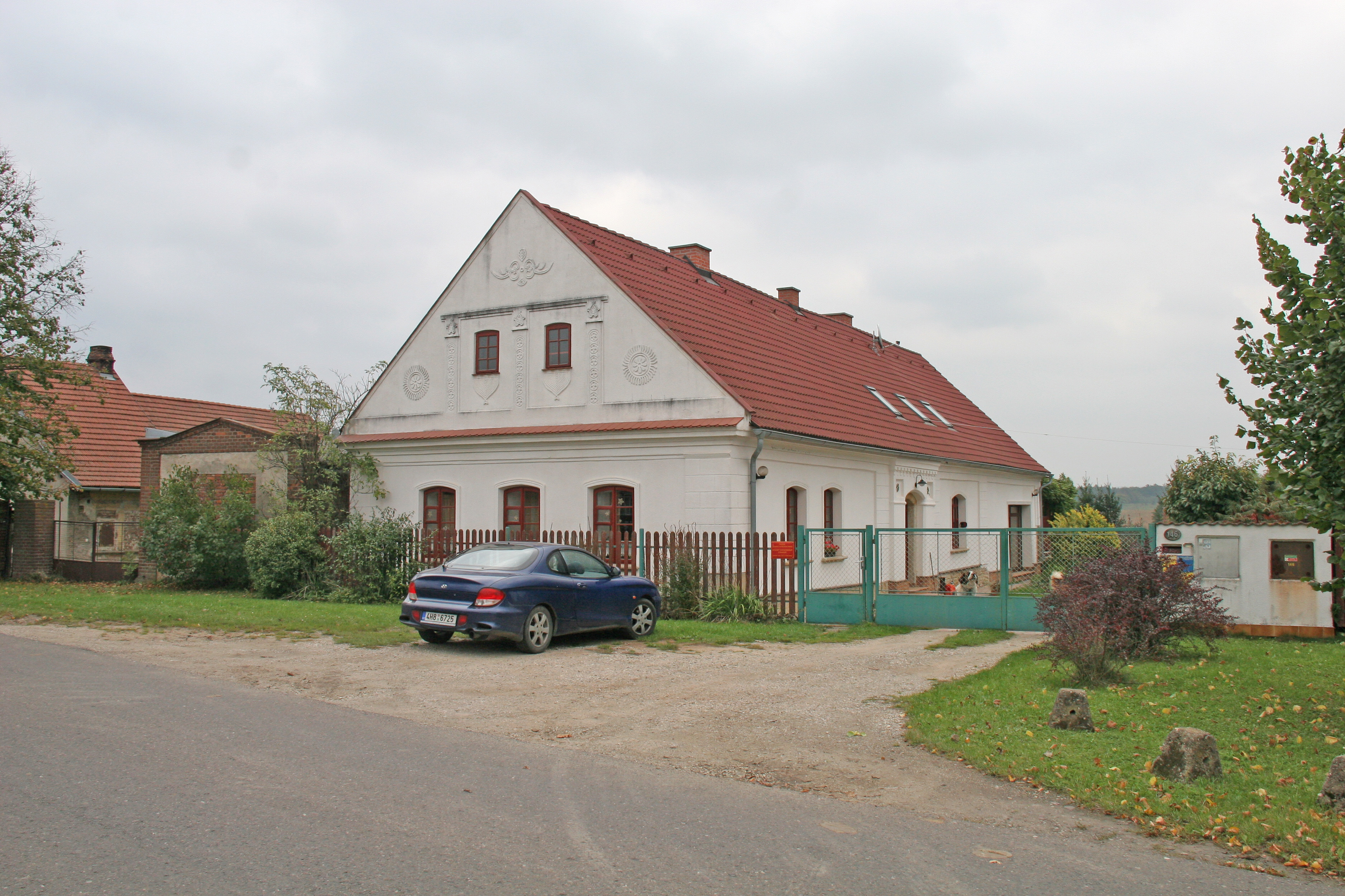 Obytné stavení usedlosti čp. 146, Jeníkovice 146, Jeníkovice (okres Hradec Králové).